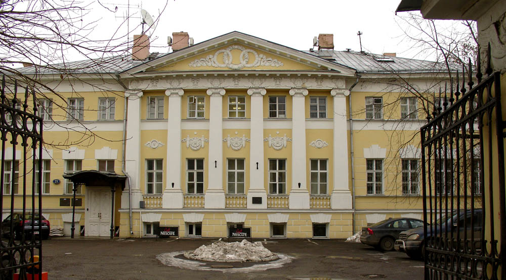 21, Bolshaya Ordynka, Moscow